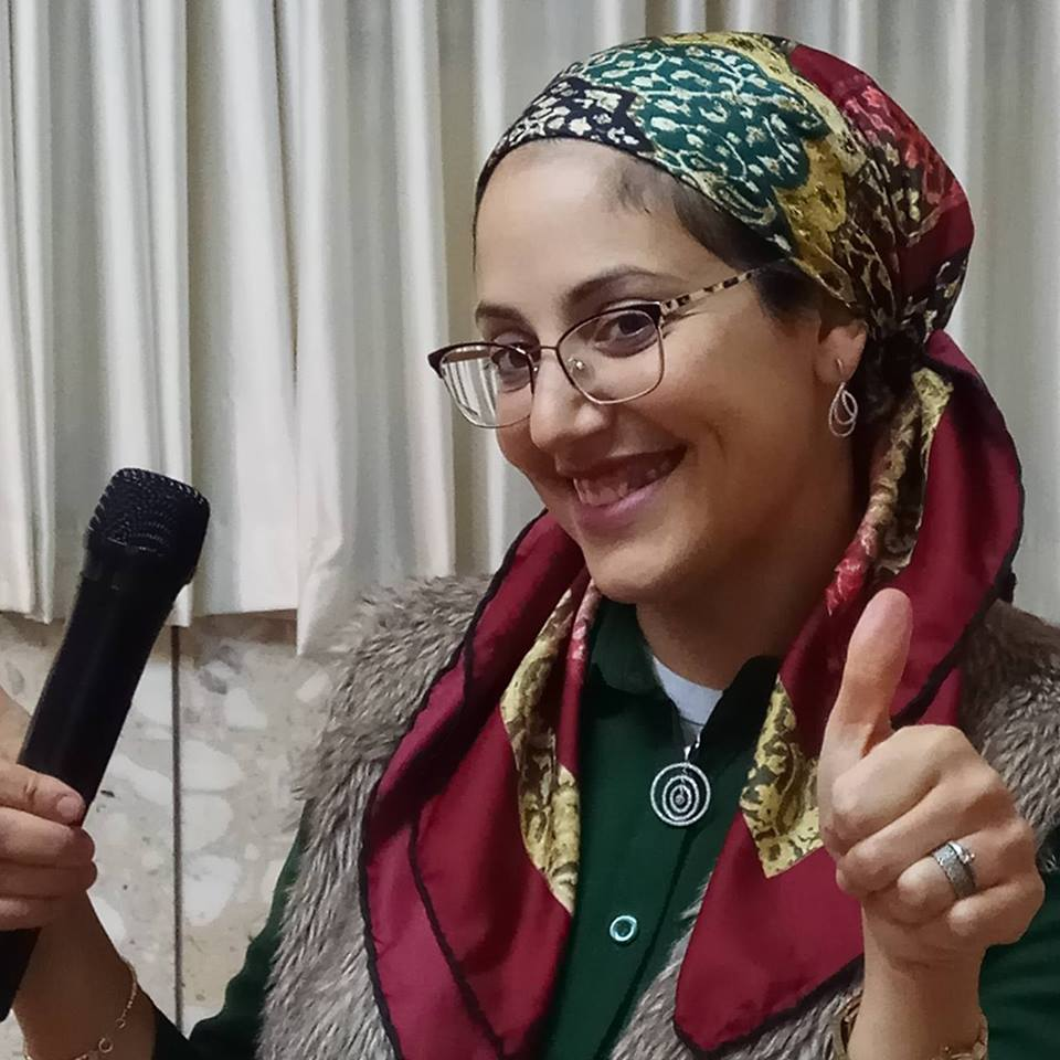 יוכי דנחי, עוסקת בייעוץ חינוכי ותמיכה רגשית לאימהות, ילדים וצוותי הוראה.